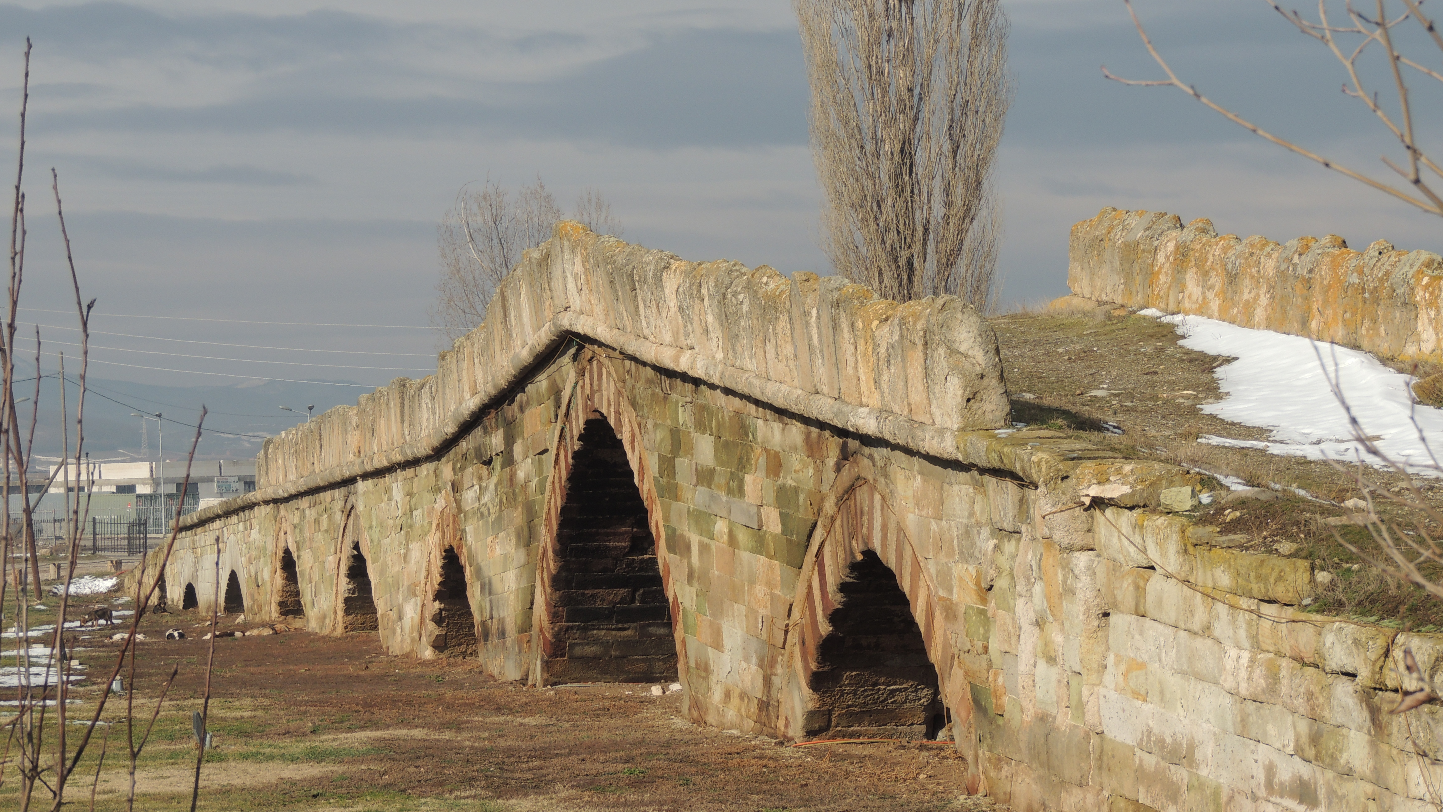 Ura mesjetare me nëntë harqe